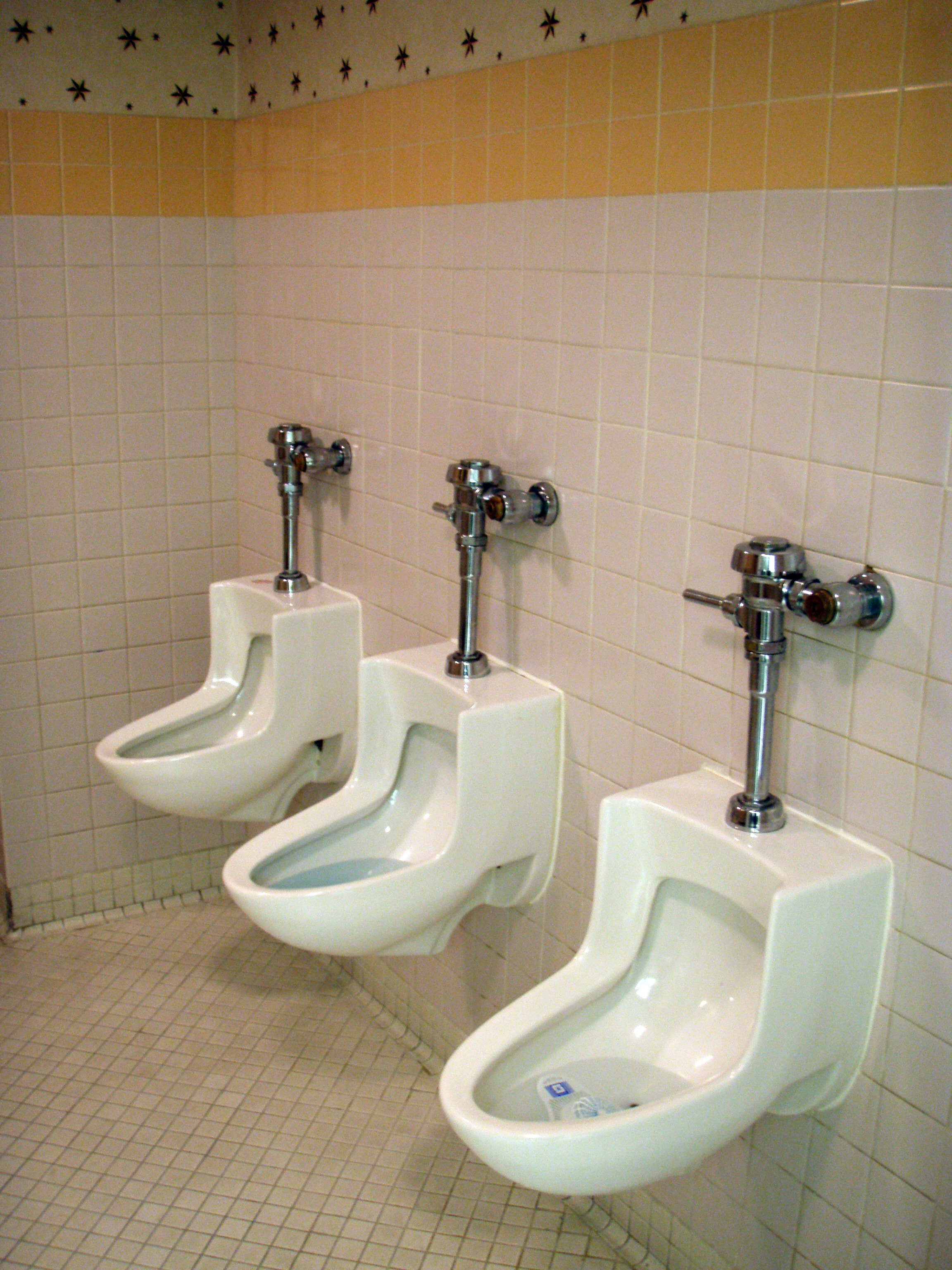 Urinarios